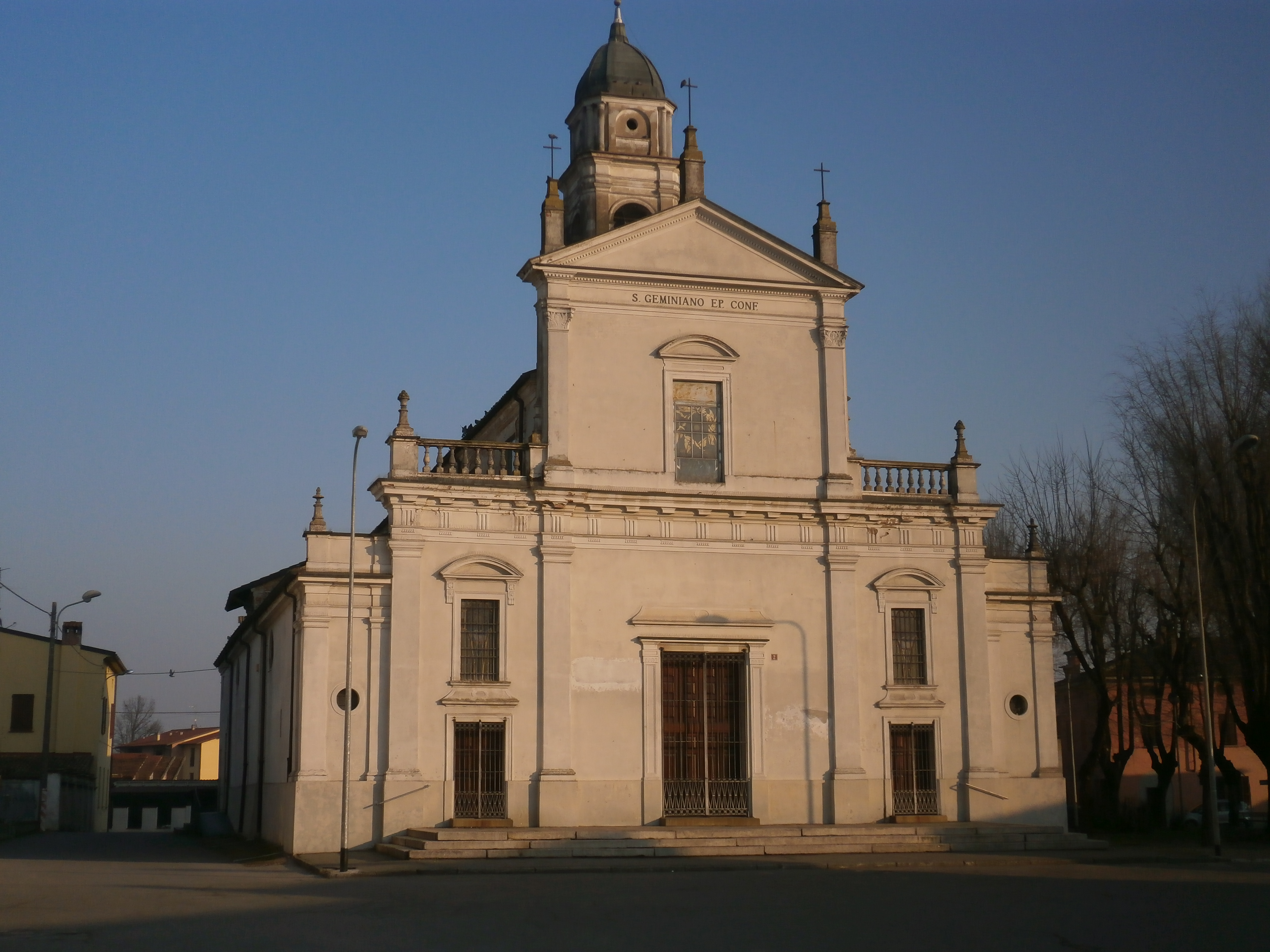 Pieve d'Olmi - Chiesa parrocchiale di San Geminiano